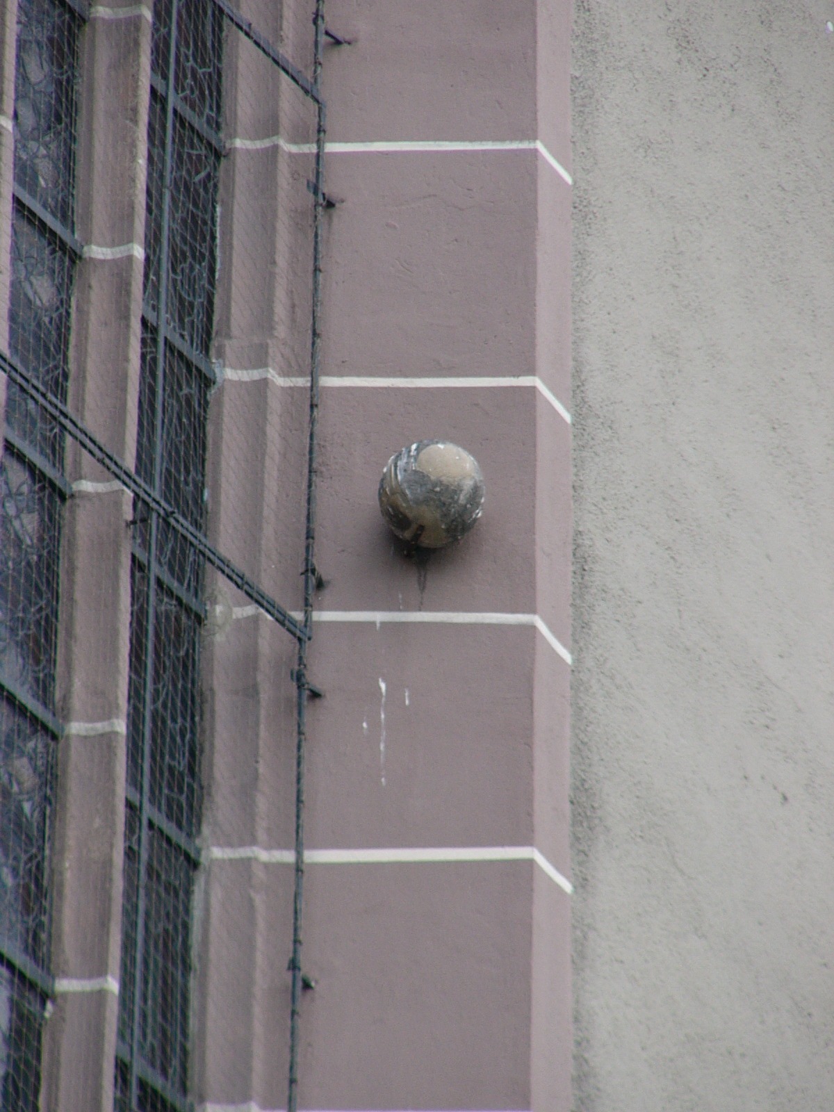 Rückseitiger Fensterrahmen von St. Michaelis in Hof, eingemauerte steinerne Kanonenkugel von 1553